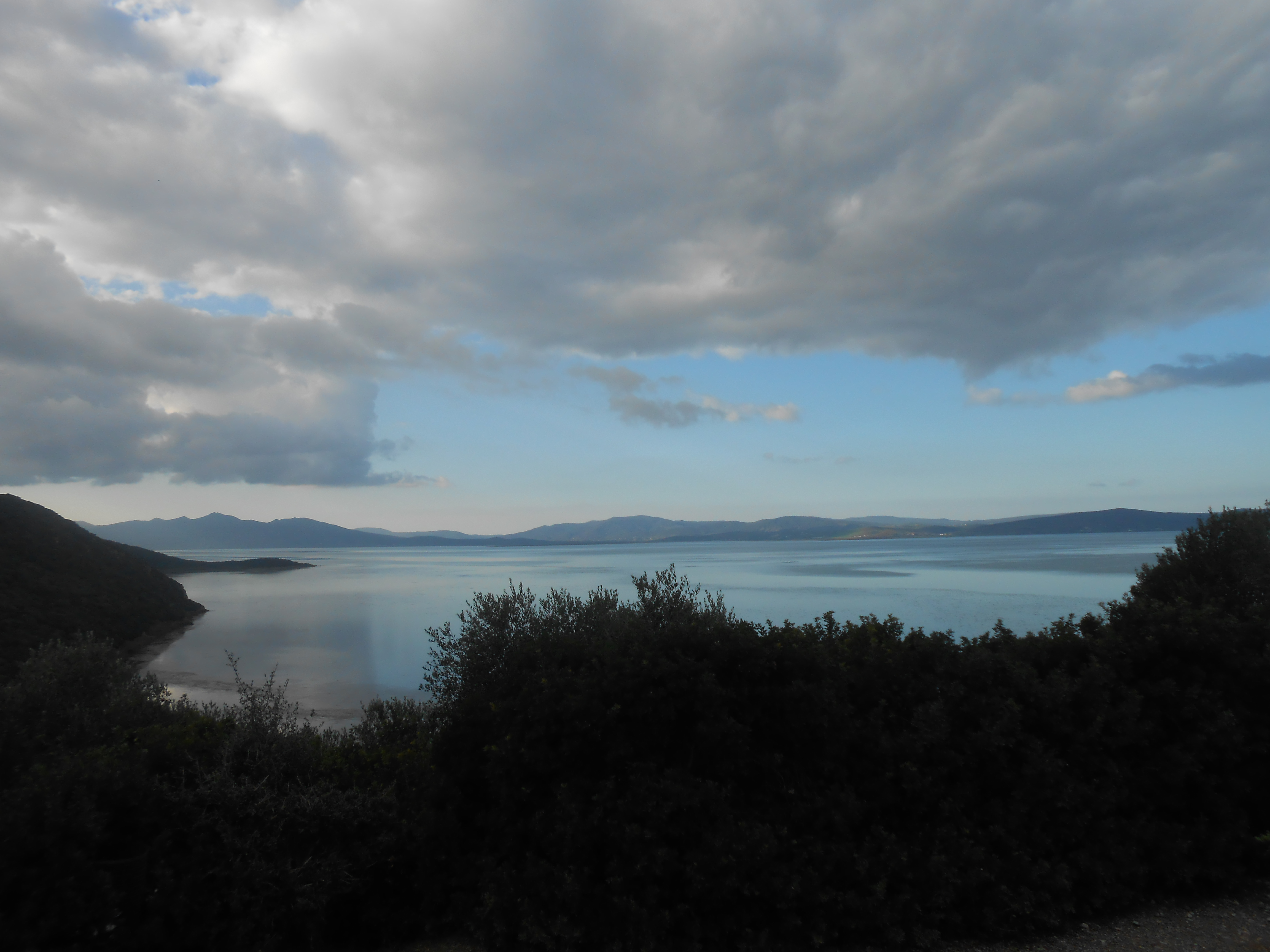 Parc National d'Ichkeul - Tunisie